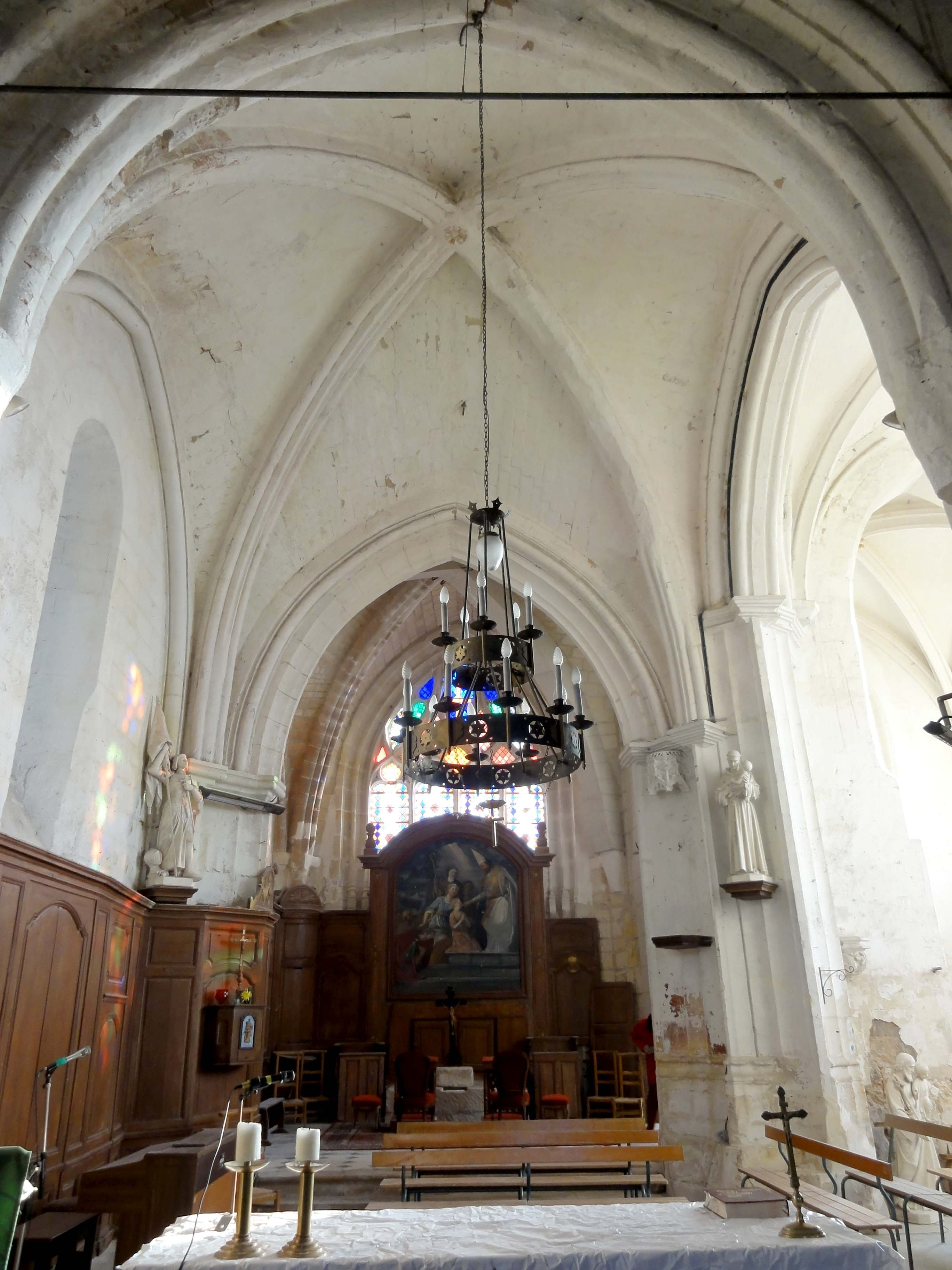 Intérieur de l'église - voir de l'église.